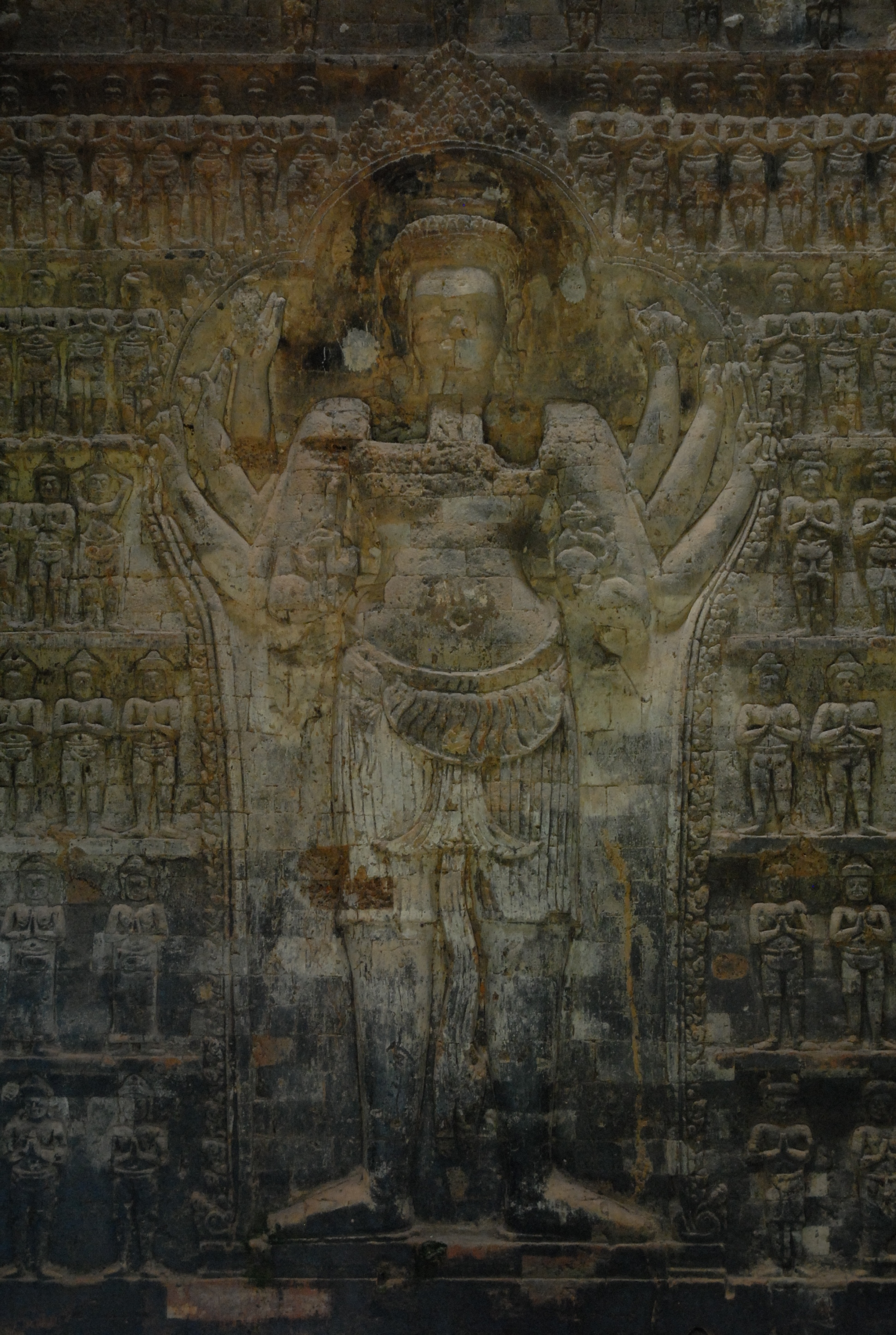 Cambodge, site archéologique d'Angkor, temple de Prasat Kravan, sanctuaire central : Vishnu à 8 bras